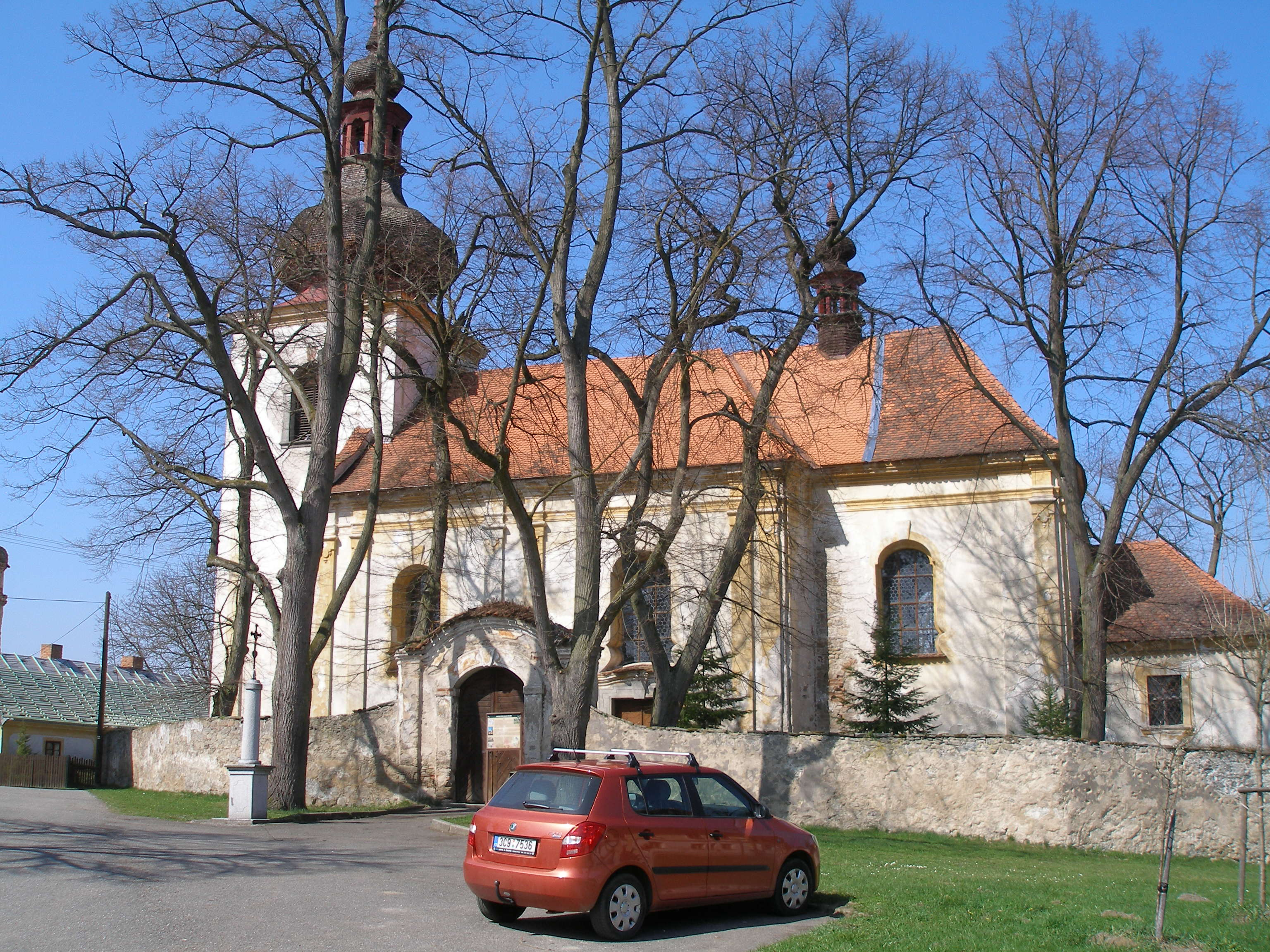 Kostel sv. Václava, Kadov